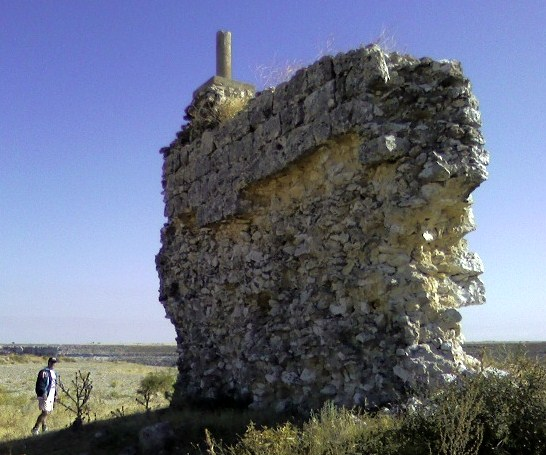 Ruinas de la torre de la desaparecida Iglesia del despoblado de Corcos, situado en el páramo que lleva su nombre, cercano al municipio de Fuentelisendo (Burgos). Ésta, se despobló a finales del siglo XVII y se adscribió a Fuentelisendo a donde se llevaron su sonora campana y su pila bautismal.